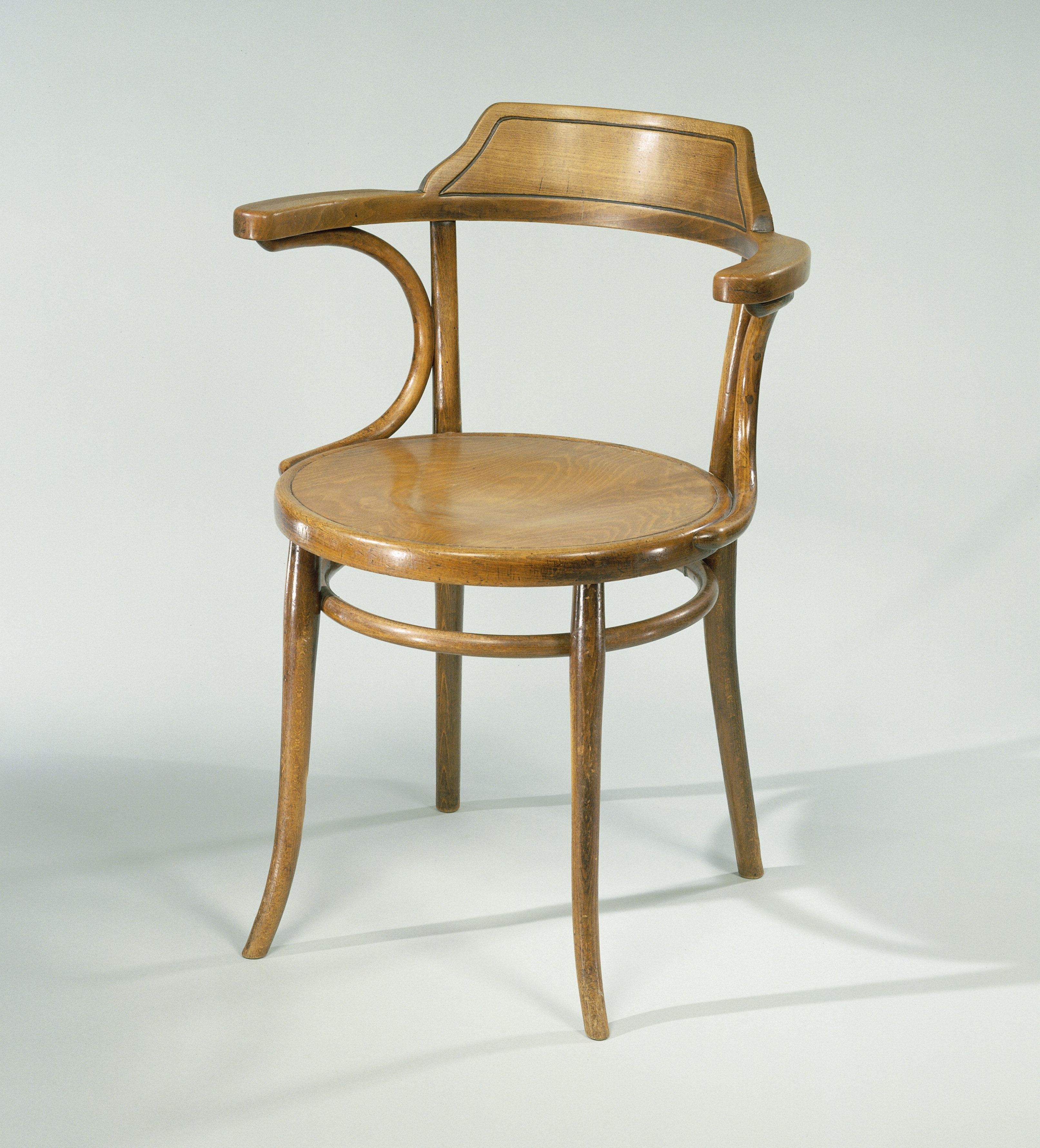 IdentificatieTitel(s): Bureaustoel van dr. W. DreesObjecttype: bureaustoel Objectnummer: NG-1991-4-42Opschriften / Merken: fabrieksmerk, binnenkant opstaande rand onder de zitting - voor, gebrand?: ‘Thonet’ (Gemaakt in de fabriek van de gebroeders Thonet.)Omschrijving: Waarschijnlijk heeft Drees kort na 1910 deze bureaustoel aangeschaft. Hij heeft hem zijn leven lang gebruikt. De zitting werd eenmaal vernieuwd. De stoel is op diverse foto's van Drees aan zijn bureau te zien. Het was een vooruitstrevende aankoop: Thonet stond voor modern meubilair.VervaardigingVervaardiger: ontwerper: Otto Wagnerfabriek: Gebrüder ThonetPlaats vervaardiging: WenenDatering: 1902 - 1910Materiaal: beukenhout metaal ziting: triplex Techniek: lijmen / schroeven (handeling) / draaiend bewerkenAfmetingen: h 85 cm. zitting: d 47 cm. d 50 cm. × g 6 kgOnderwerpWanneer1902 - 1988WaarDen HaagWieWillem DreesVerwerving en rechtenCredit line: Schenking van de heer J.M. Drees, Den Haag en de heer W. Drees jr., Den HaagVerwerving: schenking 13-feb-1991Copyright: Publiek domein